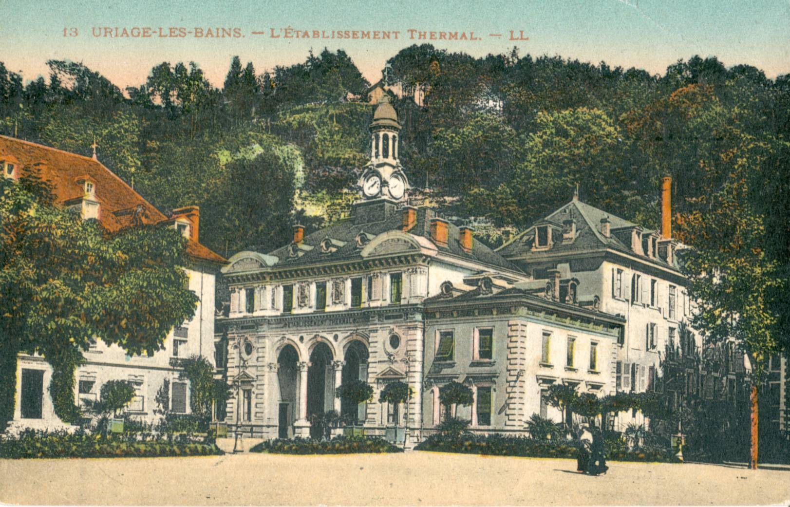 Carte postale ancienne éditée par LL N°13 : URIAGE (38) : L'établissement thermal